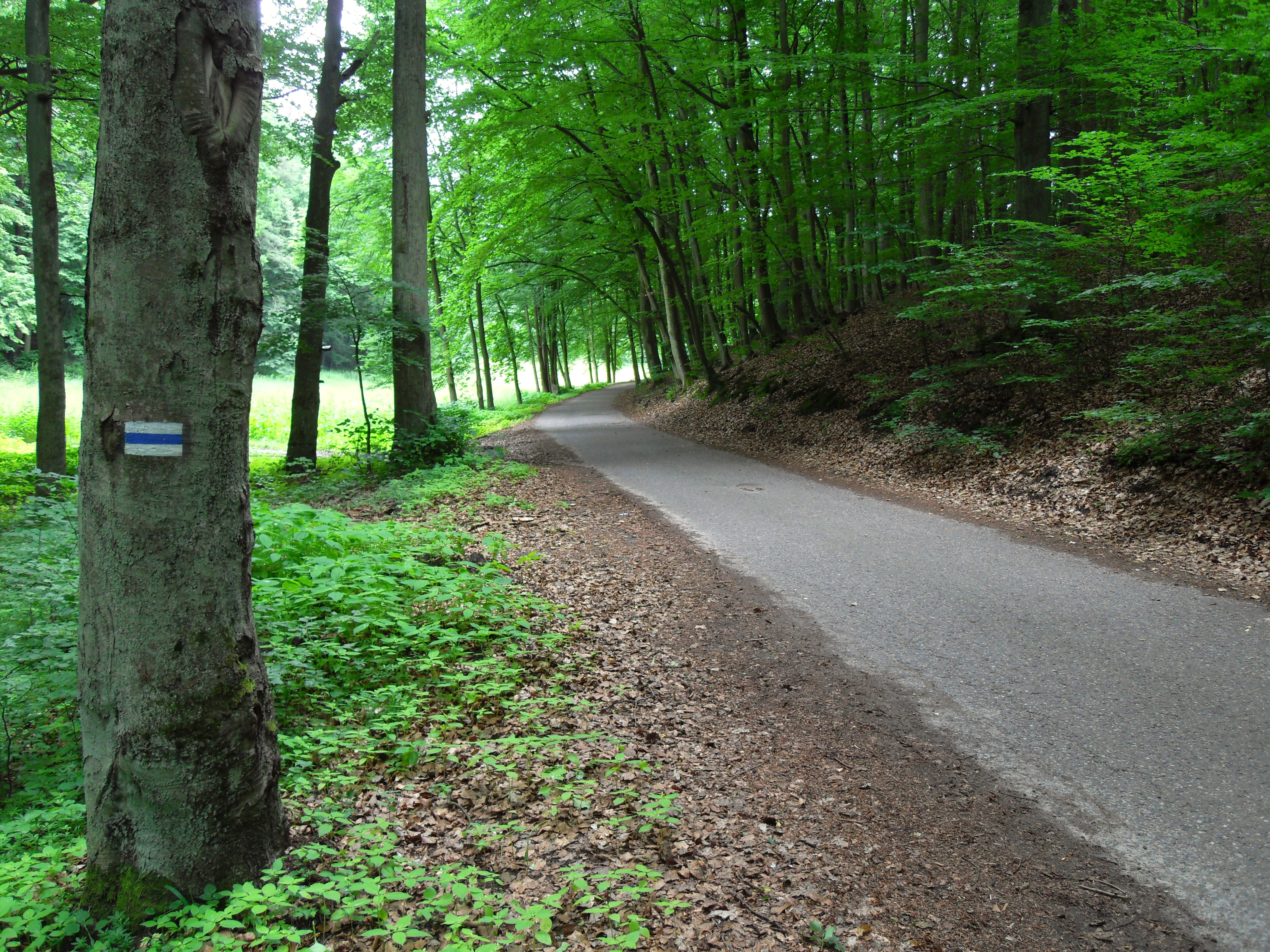 Gdańsk Matemblewo, ul. Matemblewska (TPK), Szlak Kartuski (niebieski).